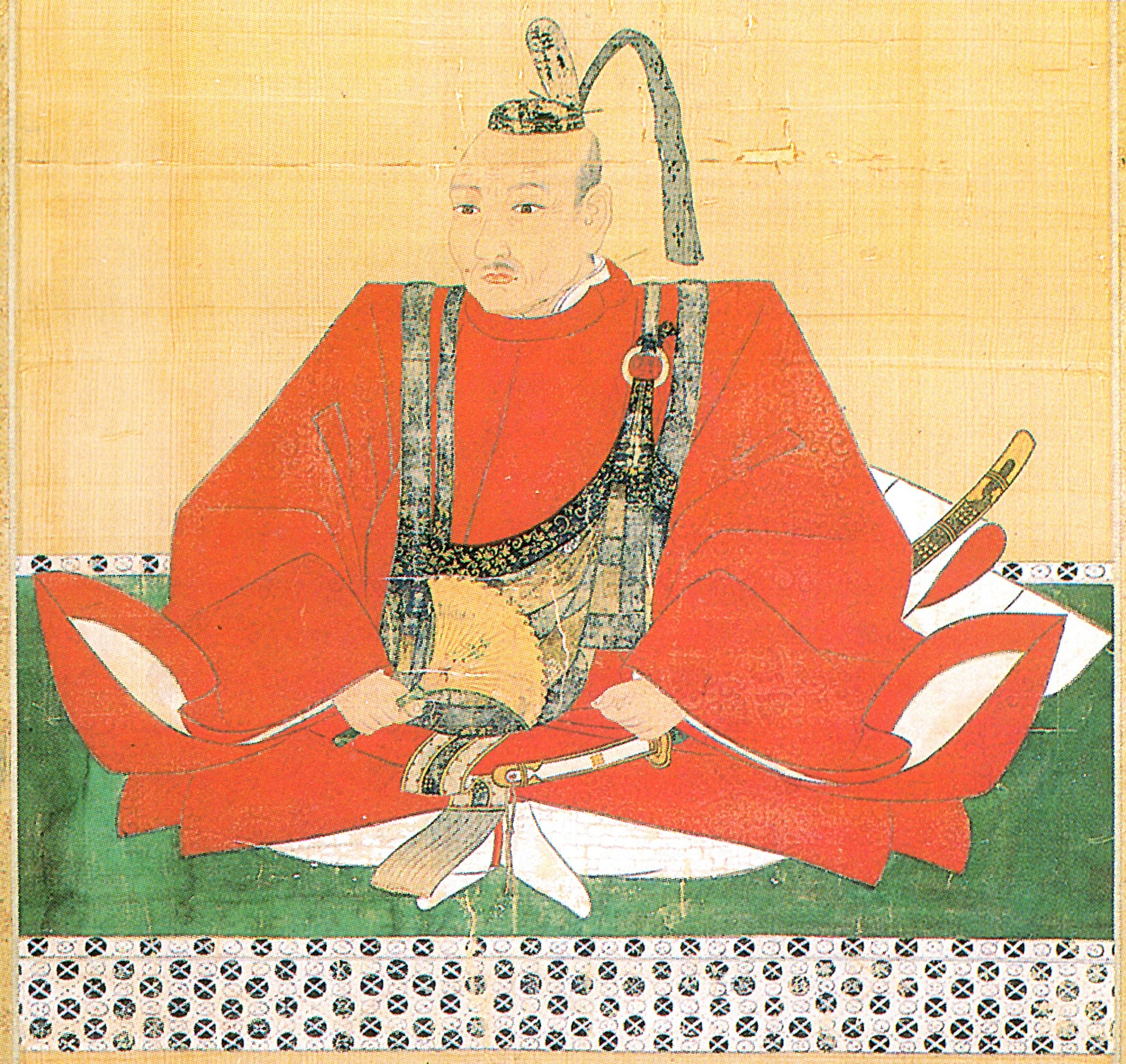 保科正光の肖像。